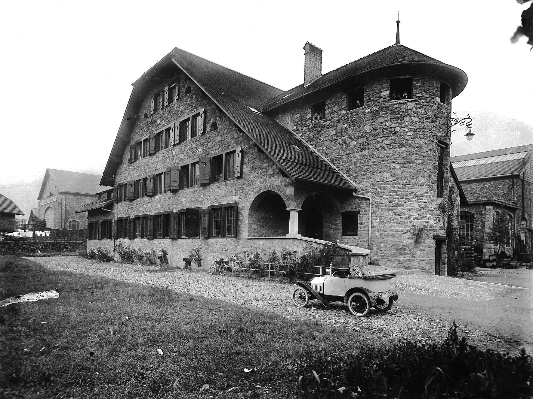 bâtiment administratif de l'usine d'Ugine en 1915